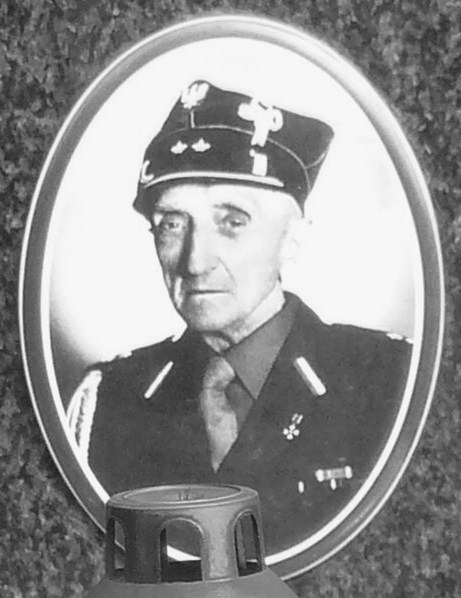 Powstaniec wielkopolski pochowany na cmentarzu w Wierzenicy.